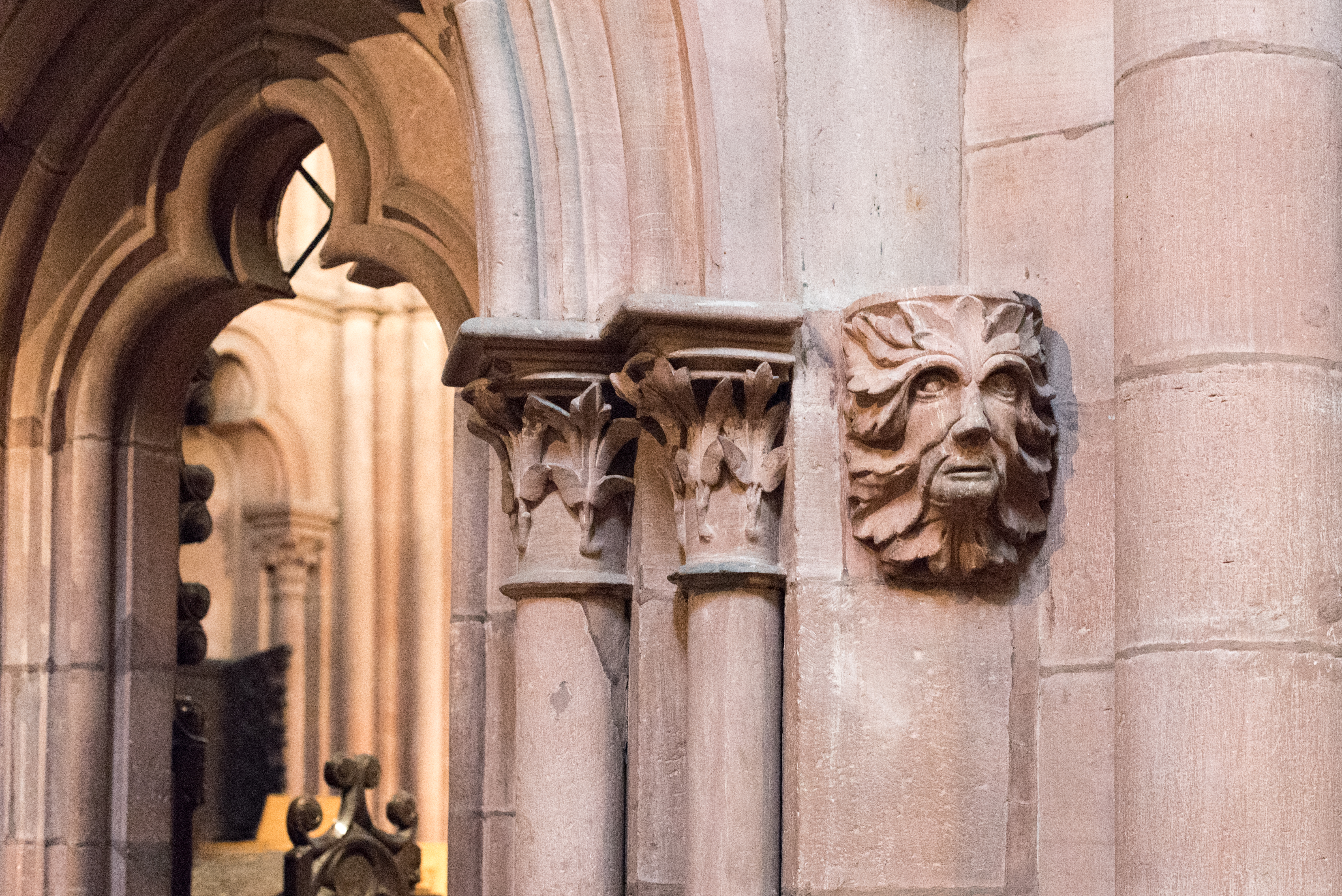 Gelnhausen, Lettner, südliche Säulen